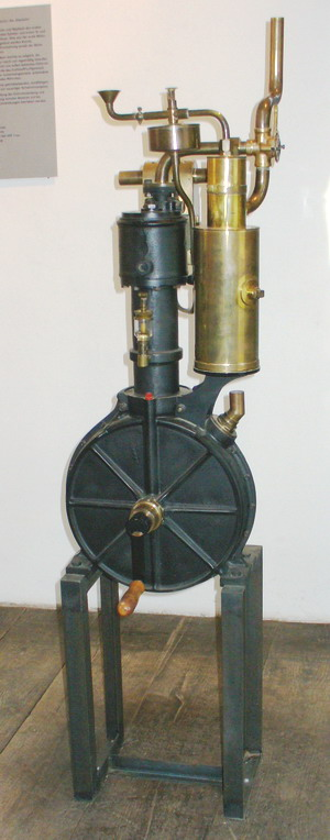 Stuttgart-Bad Cannstatt Werkstatt Gottlieb Daimler: Modell Standuhr 1885 1 cylindre